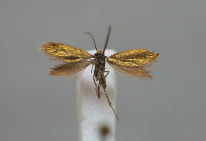 Micropterix aruncella